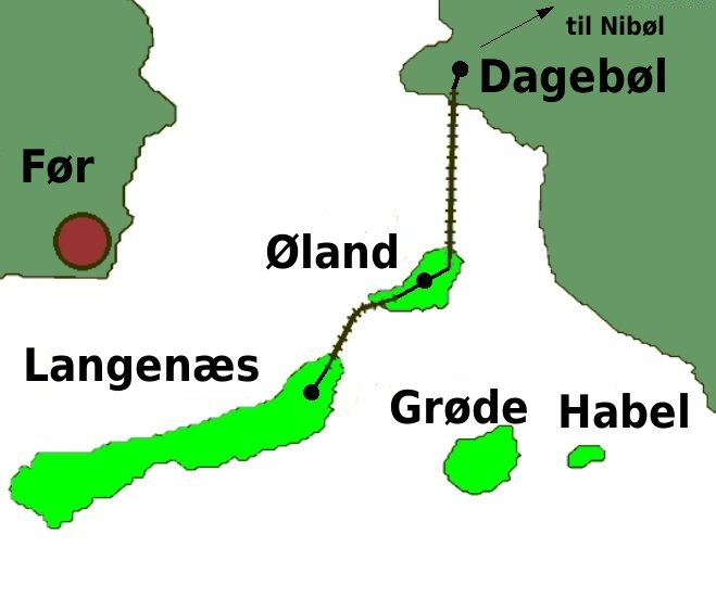 Halligbane Nibøl-Dagebøl- Langenæs